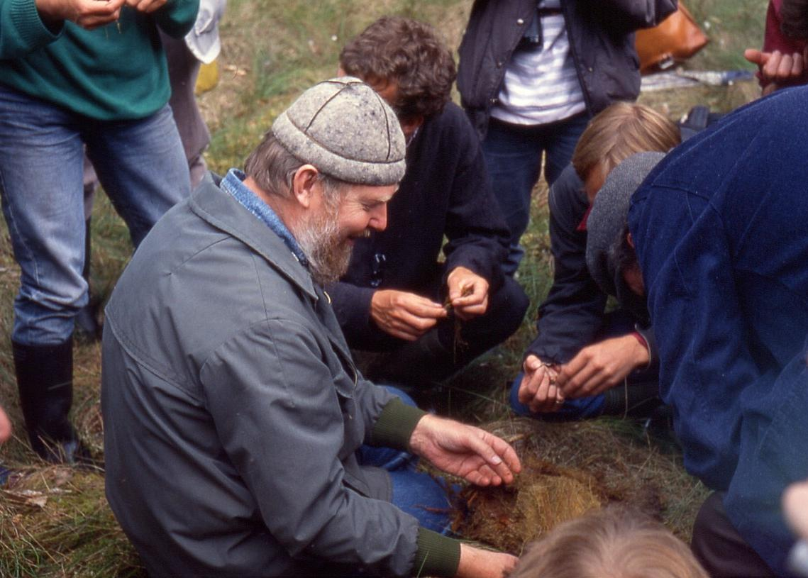 Professor Michael Succow als Leiter einer studentischen Exkursion der Technischen Universität Berlin in einem brandenburgischen Kesselmoor.